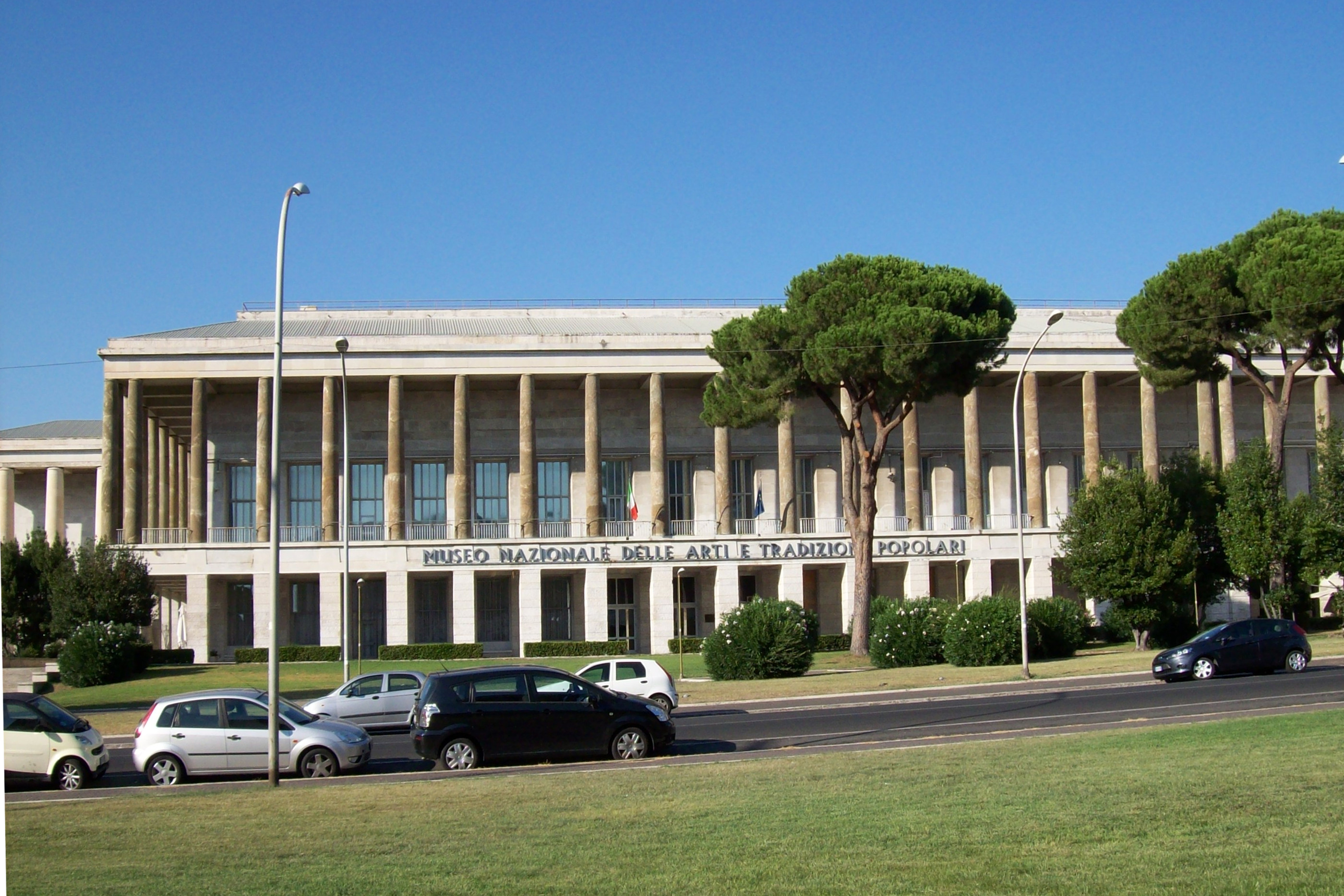 Il Museo nazionale delle arti e tradizioni popolari all'EUR, Roma